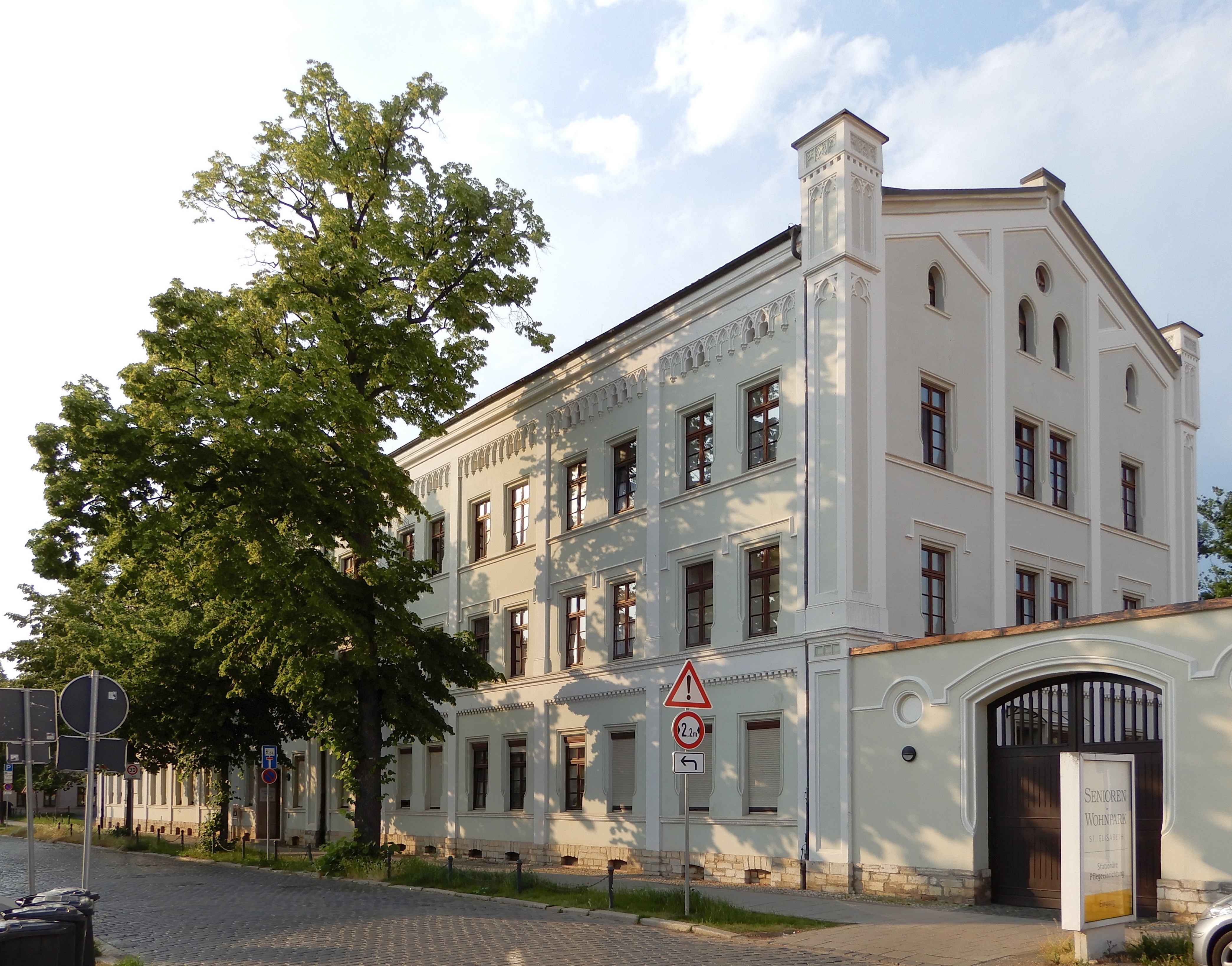 Ehemaliges Elisabeth-Hospital Vor dem Wassertor 39 in Aschersleben. 1408 als Hospital vom Zisterzienserinnenkloster St. Marien gestiftet und 1869 in Neogotik errichtet. Nach 1990 Sanierung und Nutzung als Seniorenheim.